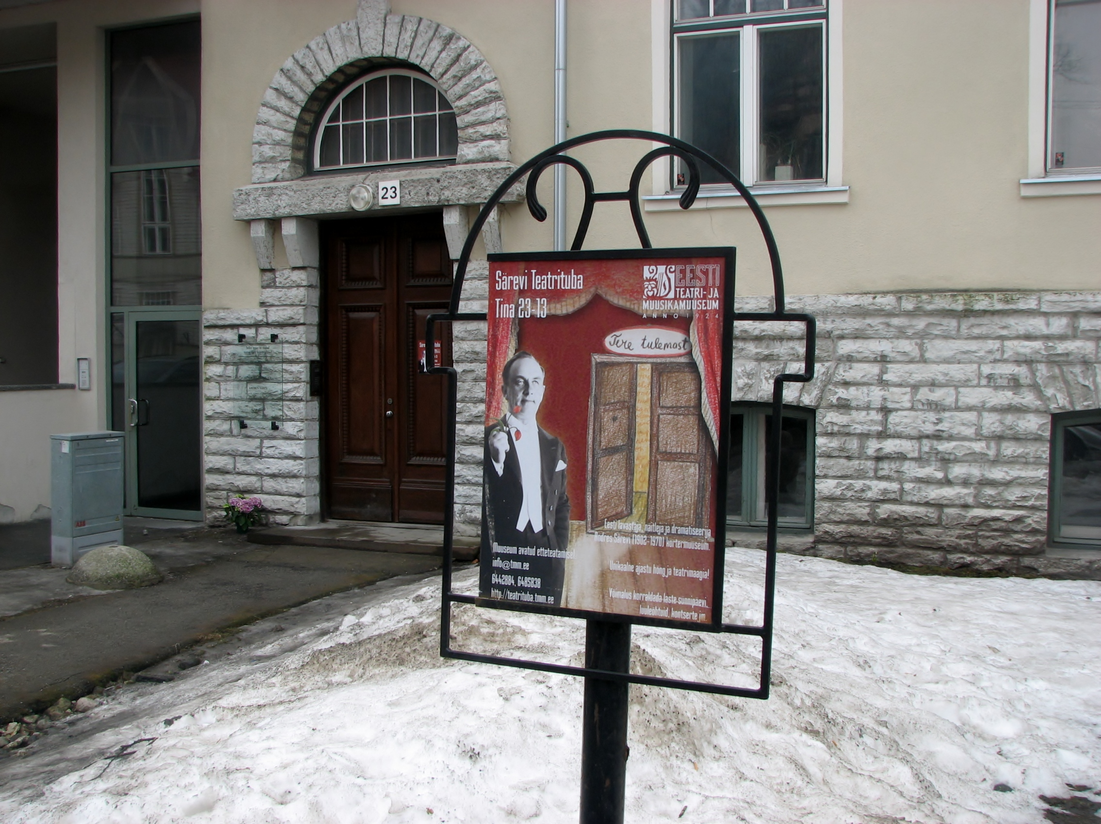 Särevi Teatritoa välisuksest vasakul avati 12. aprillil 2013 infotahvel